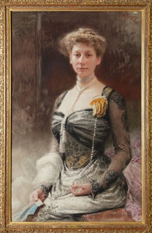 Portrait de la fille d'Alexandre Dumas fils, Jeannine d'Hauterive (1867-1943).